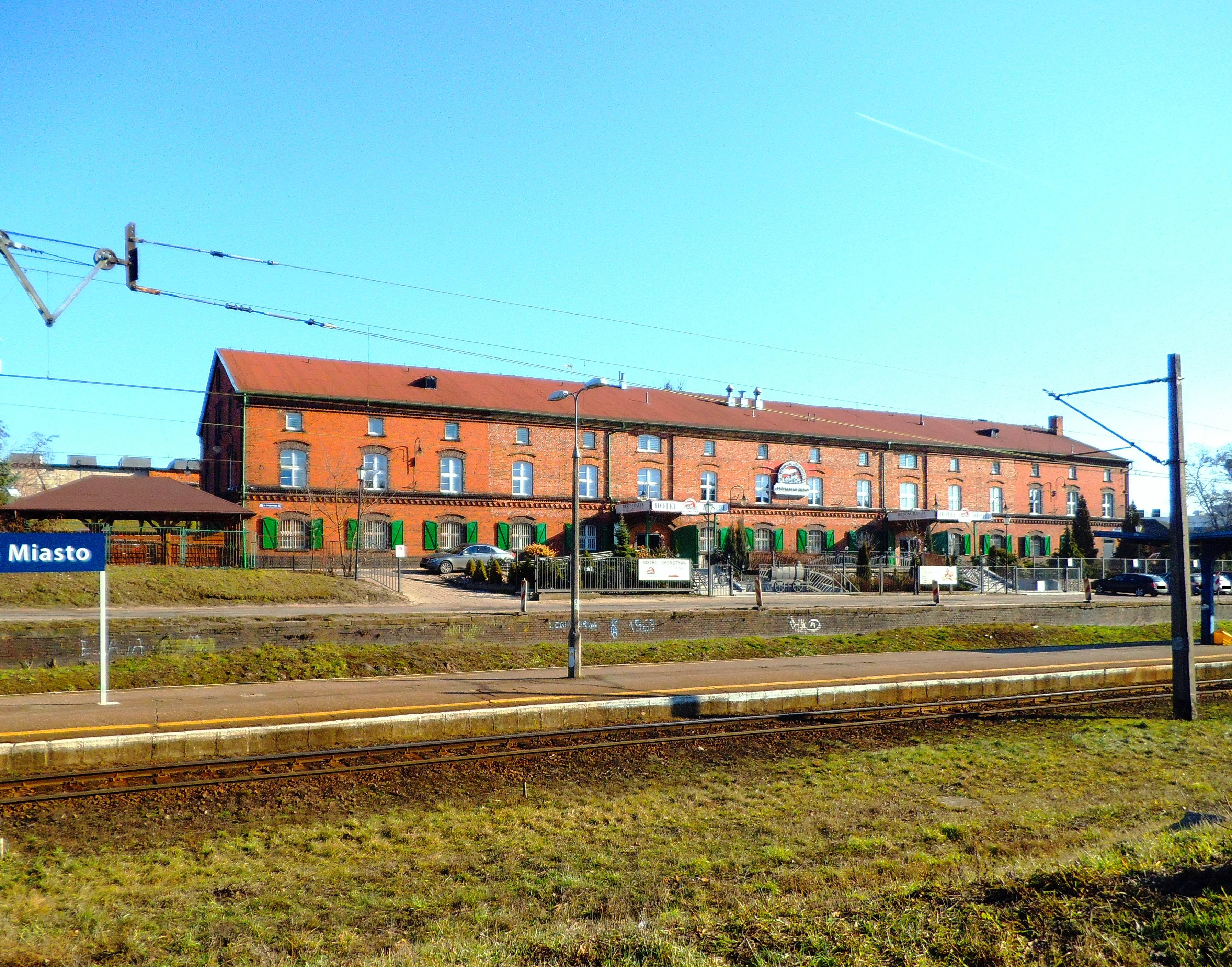 Przystanek Toruń, ul. Chłopickiego 4